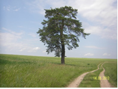 Одинокая сосна перед въездом в деревню Елейкино